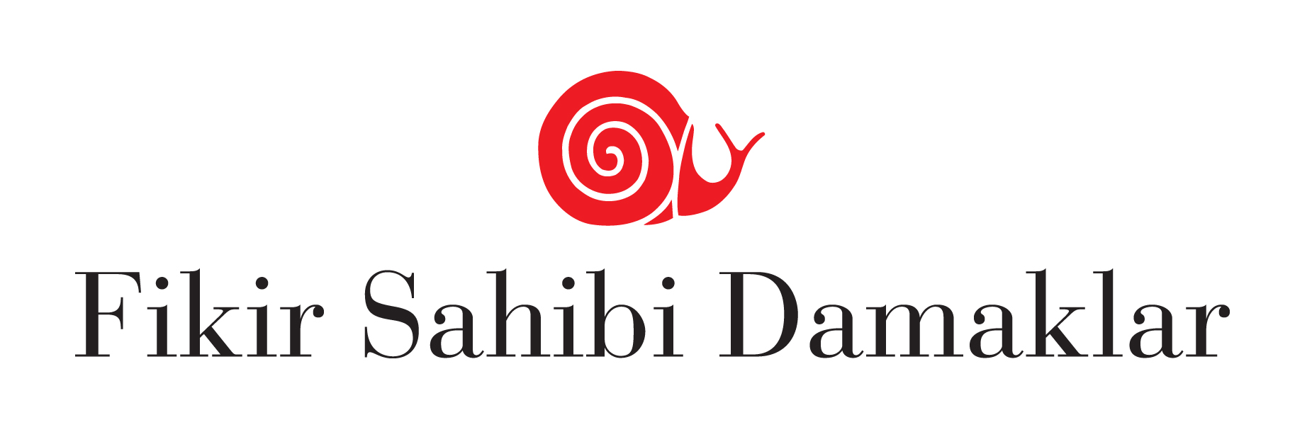 Fikir Sahibi Damaklar Logosu